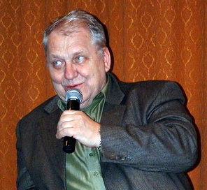 Marek Gaszyński, a Polish journalist